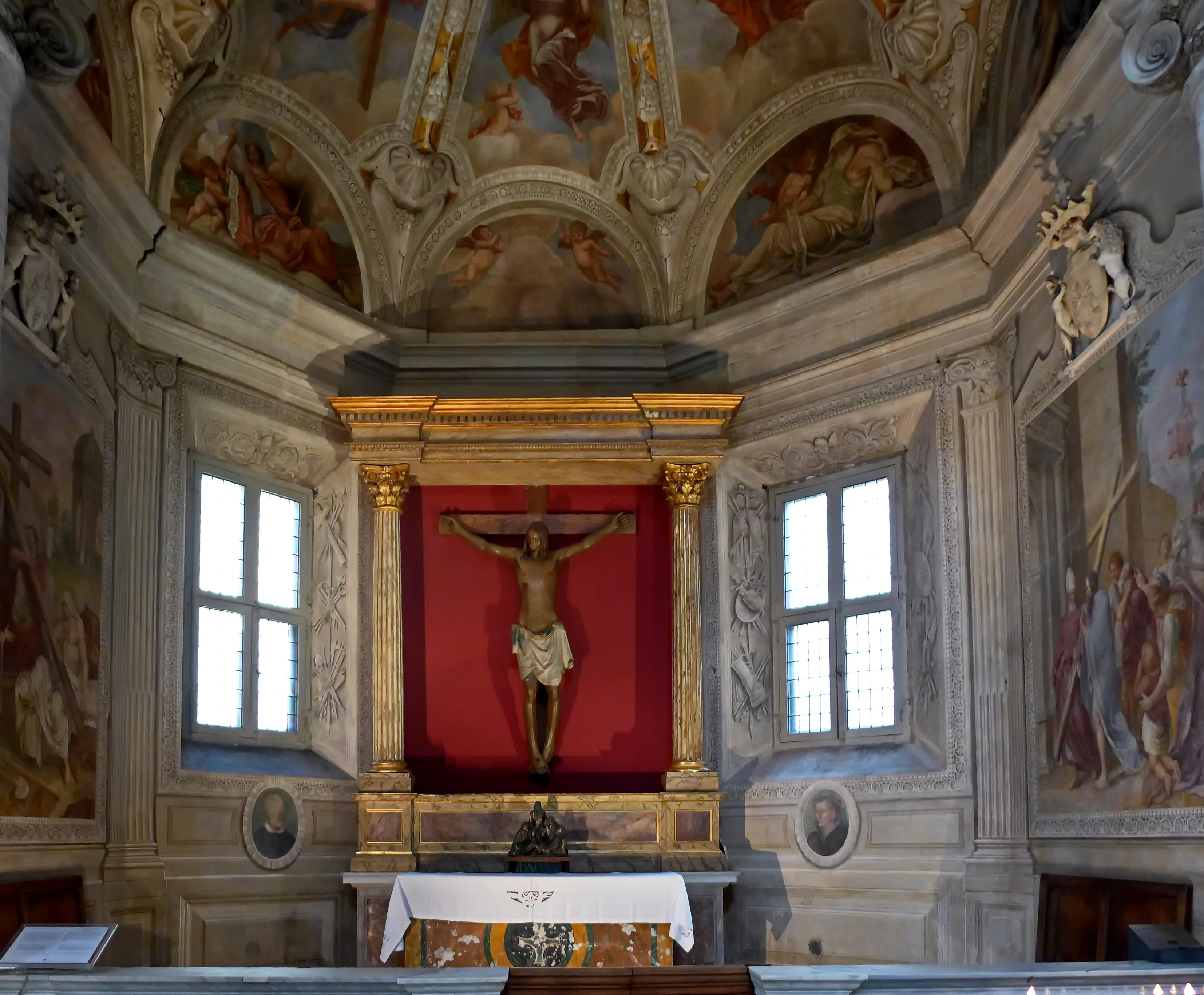 Santa Maria del Popolo Cappella del Crocefisso